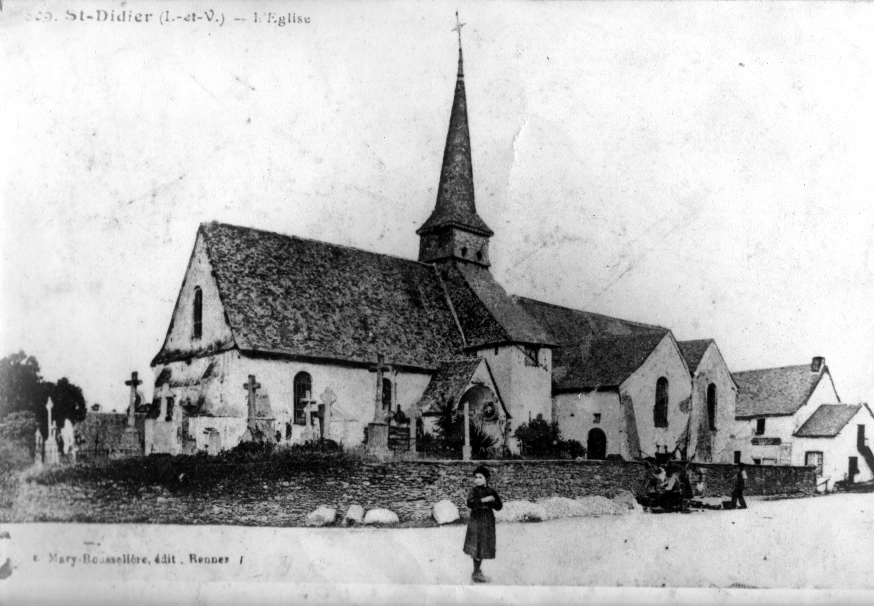 Le bourg de Saint-Didier avant 1914 (carte postale d'Edmond Mary-Rousselière) : on voit le cimetière situé dans le placître entourant l'église, celle-ci ayant encore son ancien clocher.